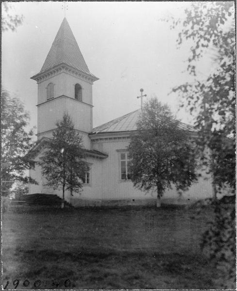 Kyrkan från sydväst.; (01) Exteriörer; Byggnadsverk; Religionsutövning - kyrkor